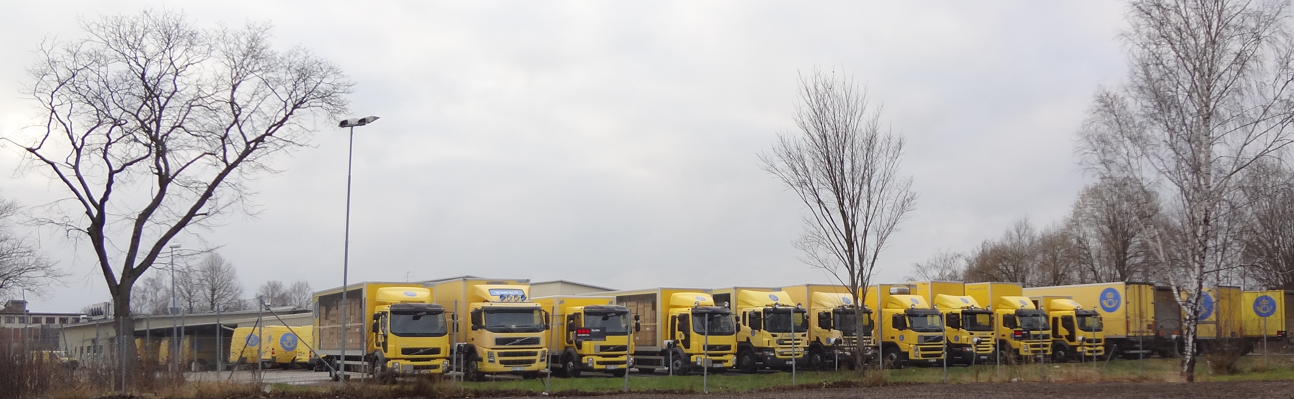 Lastbilar uppställda vid poståkeriet i Eskilstuna 2012.